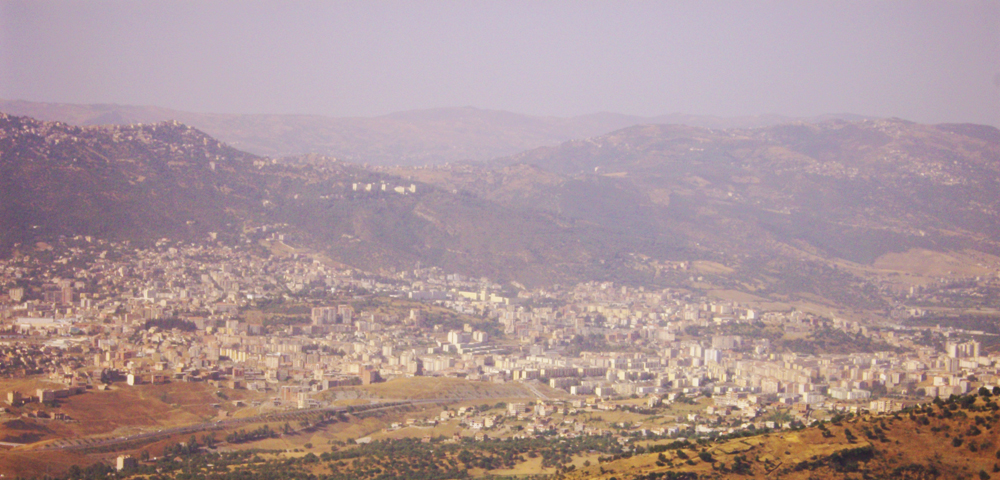 Panorama pris de Amjudh